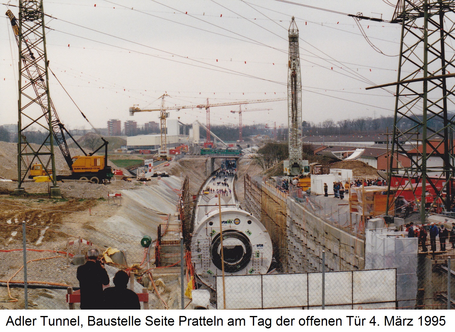 Adler Tunnel, Baustelle Seite Pratteln am Tag der offenen Tür 4. März 1995